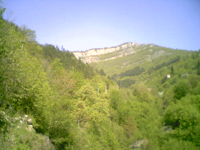 Изглед от месността Скакля гара Бов